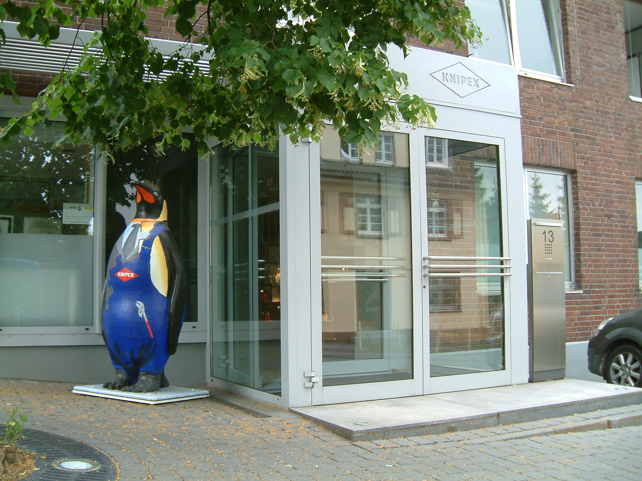 Haupteingang von Knipex in Wuppertal-Cronenberg mit "Zanguin", dem Beitrag von Knipex zur Pinguinale.